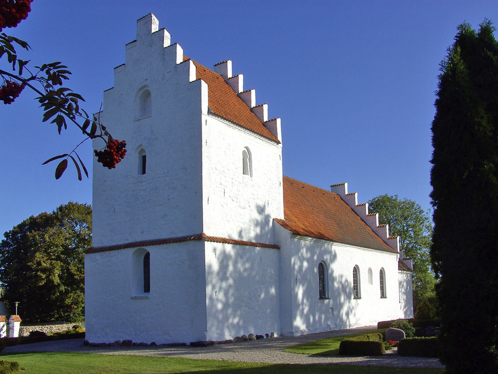 fra sydvest